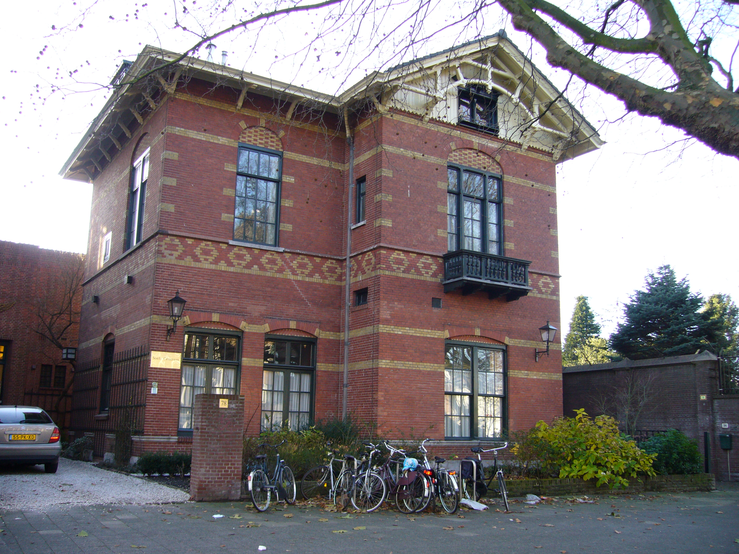 Soefi gebouw in Den Haag; voormalig station van de stoomtramlijnen Hollands Spoor – Anna Paulownastraat en Anna Paulownastraat – Scheveningen